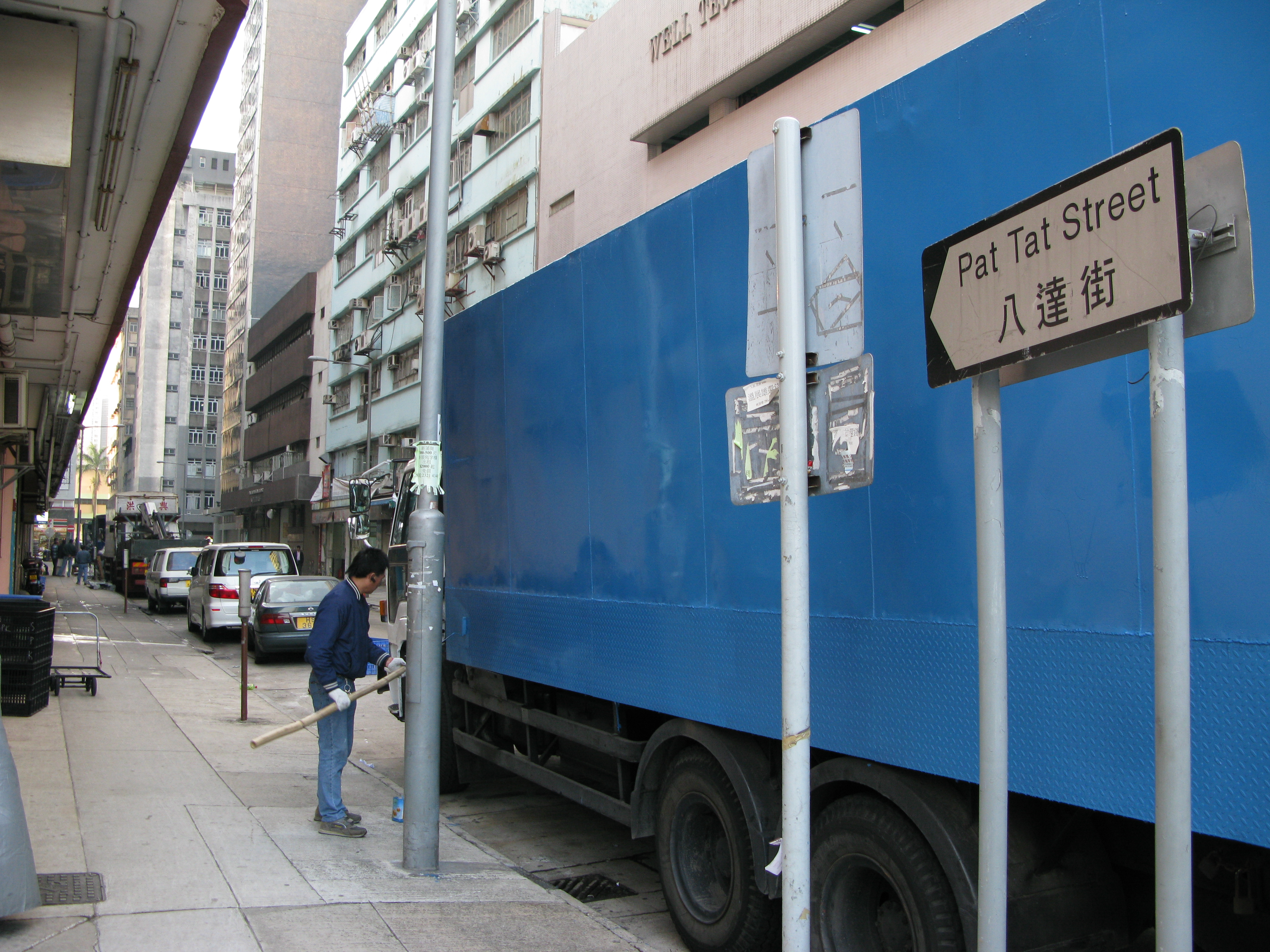 中文（香港）: 香港九龍新蒲崗八達街